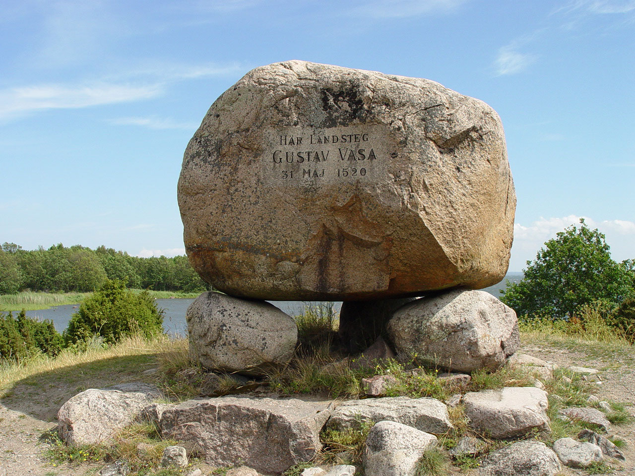 Gustav Vasa Gedenkstein an der Landestelle in Stensö bei Kalmar (1520)